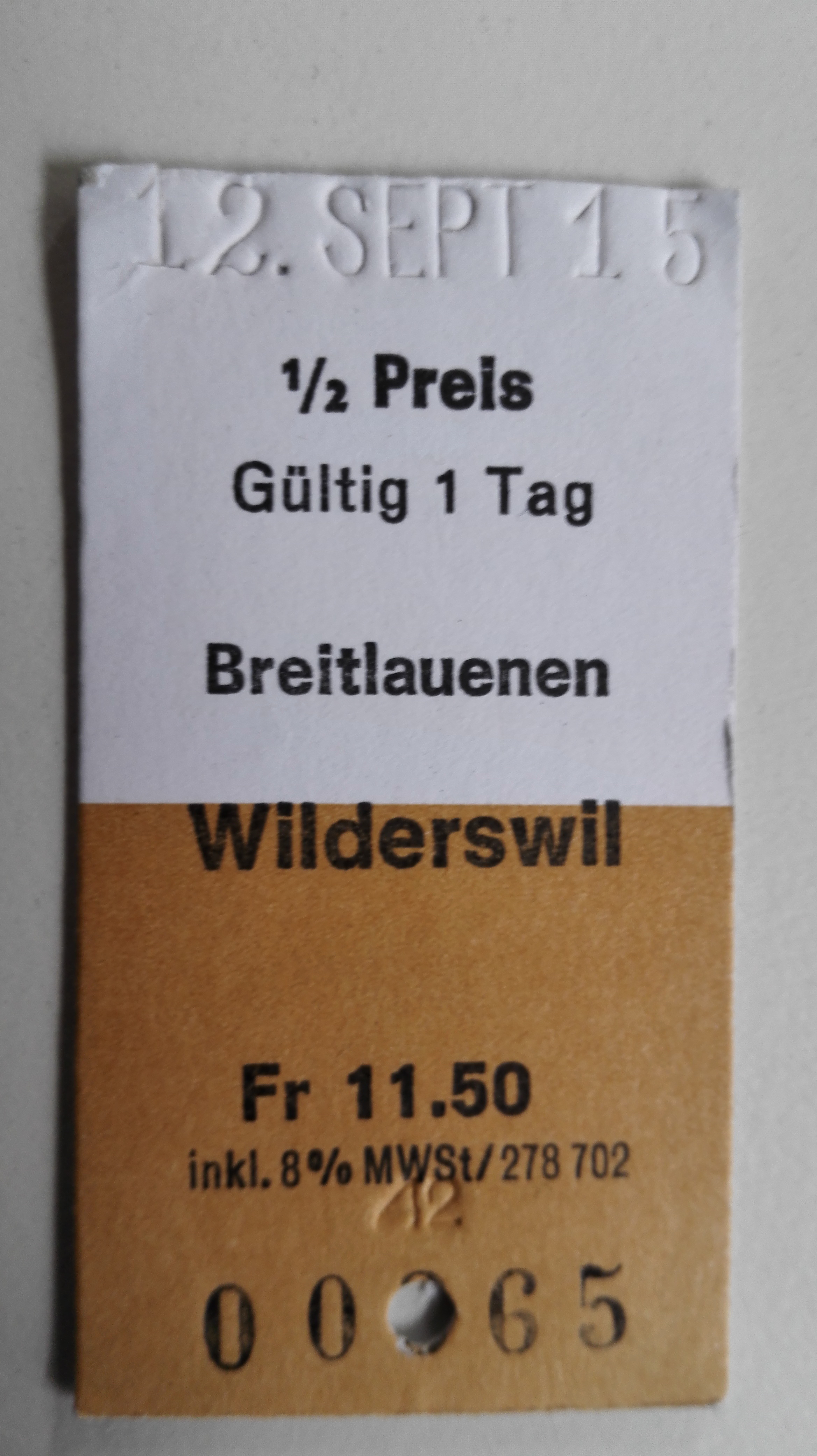 am 12. September 2015 in Breitlauenen abgestempelte Fahrkarte für eine einfache Fahrt Breitlauenen - Wilderswil zum 1/2 Preis (Kinder oder Besitzer von Vergünstigungsabonnementen (Halbtax-Abonnement, Generalabonnement)